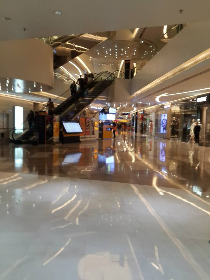 中文（香港）: 深圳喜薈城內部